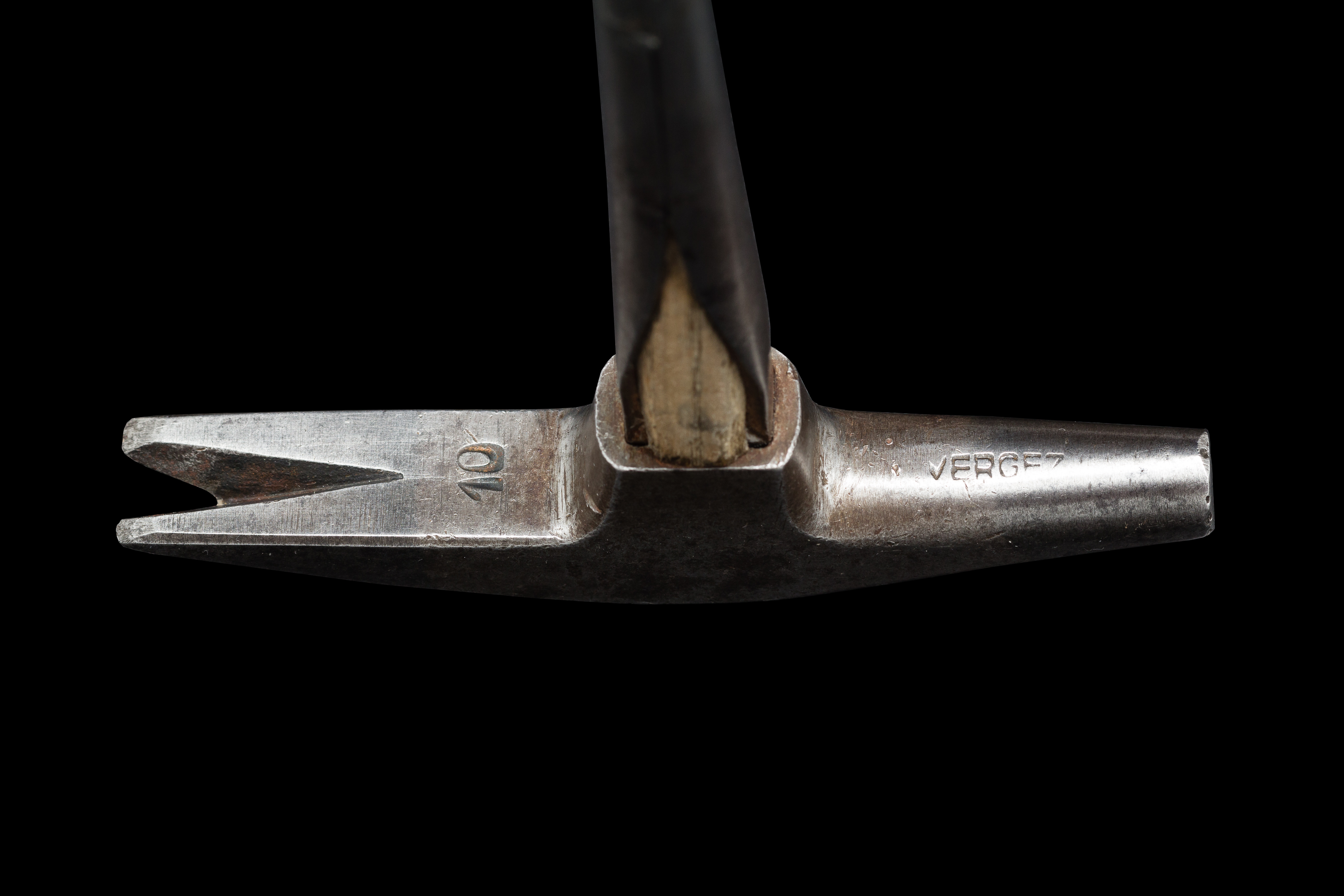 Marteau ramponneau Vergez n°10.